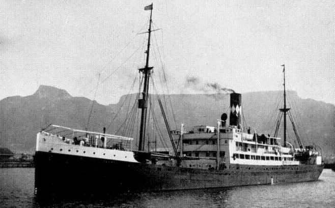 Der Hamburg-Süd Postdampfer RIO NEGRO als CITY of PALERMO der Ellerman Lines in Südafrika